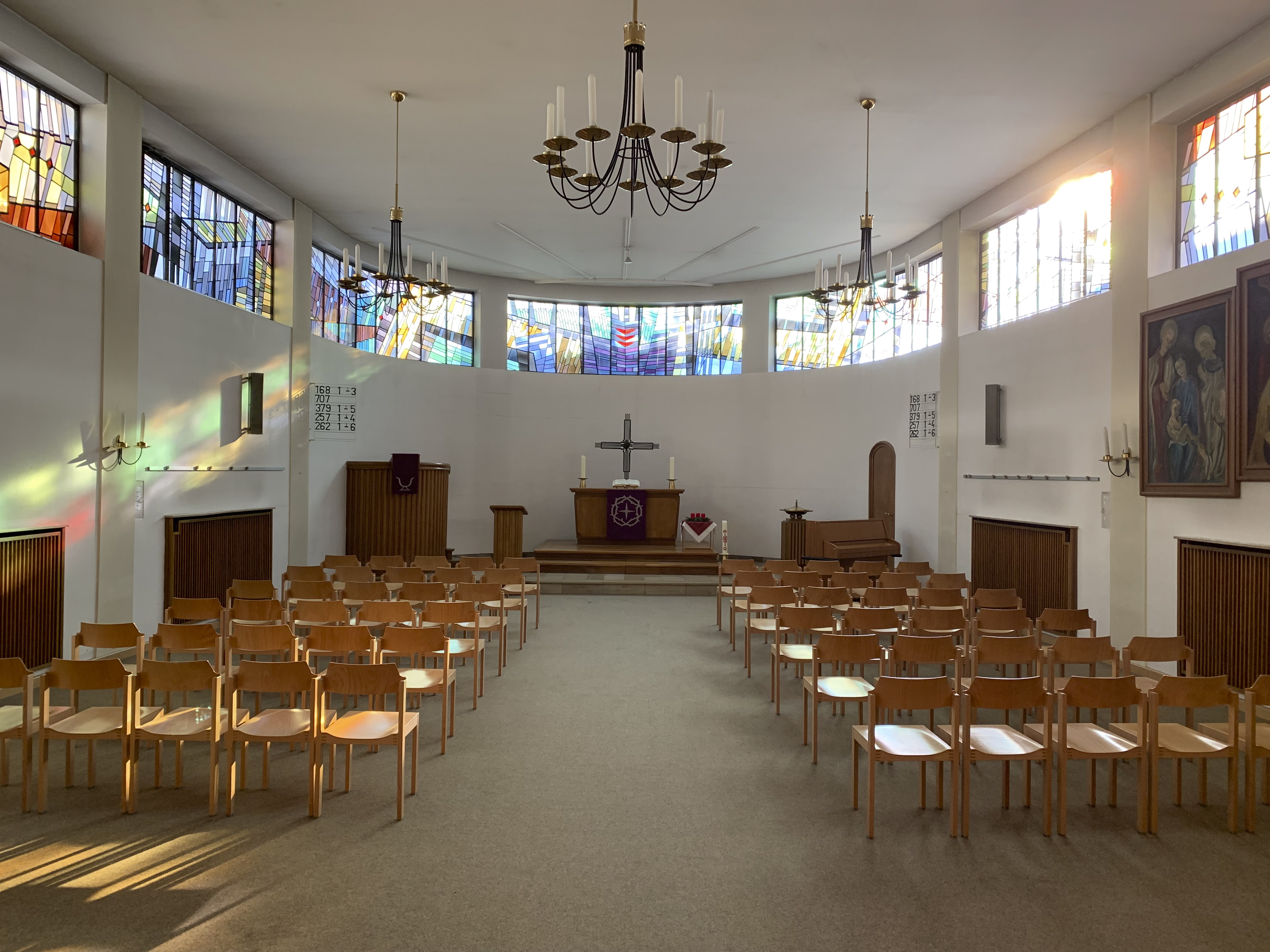 Lukaskirche Gießen, Hessen, Deutschland